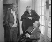 Alexandre Trauner (assis) en 1961 avec les frères Prévert, dans le film documentaire Mon frère Jacques de Pierre Prévert